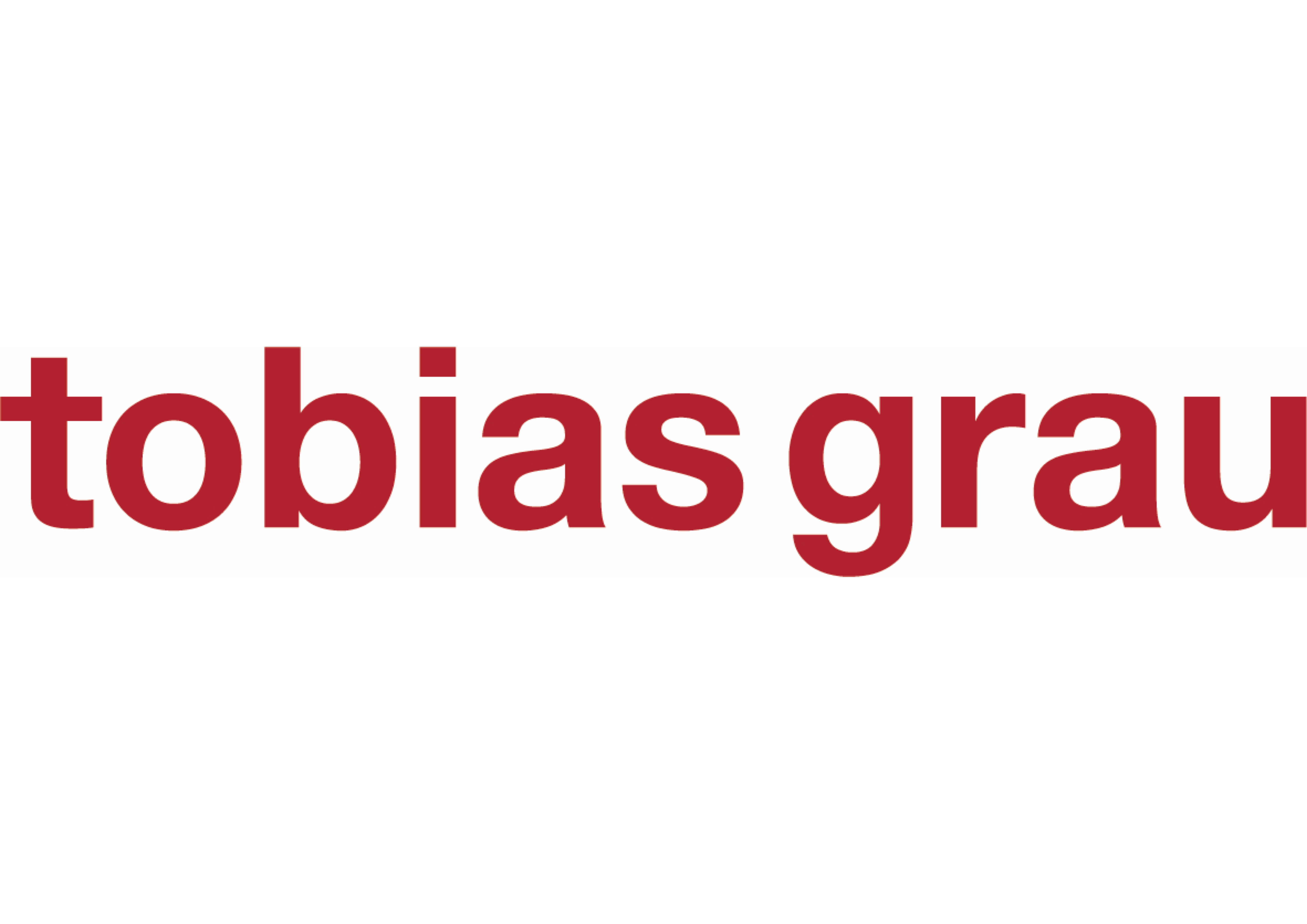 2018 führt Tobias Grau ein neues Logo und ein neues Brand Design ein.